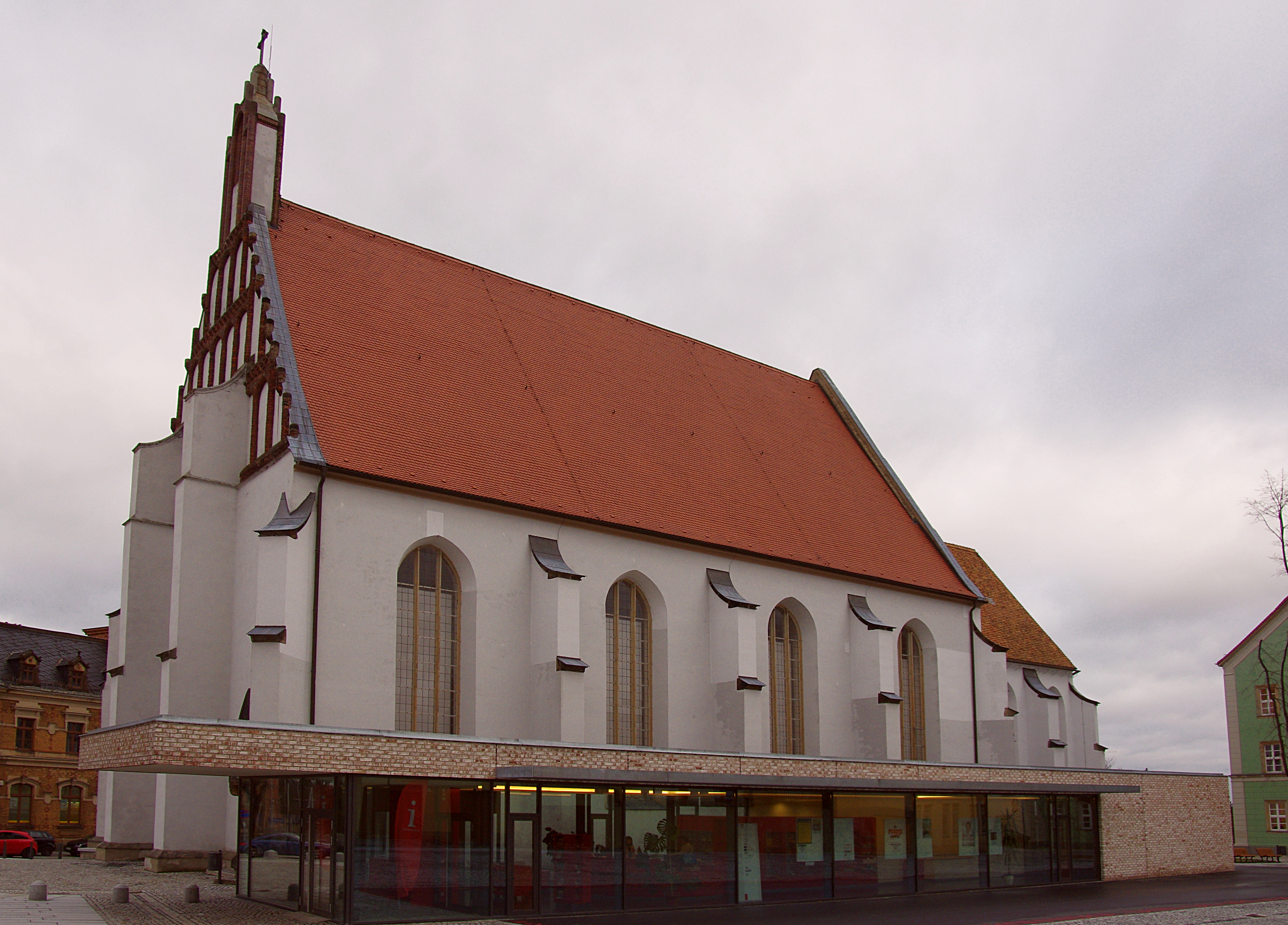 Klosterkirche St. Annen mit dem Funktionsanbau der Tourist-Info, Kamenz